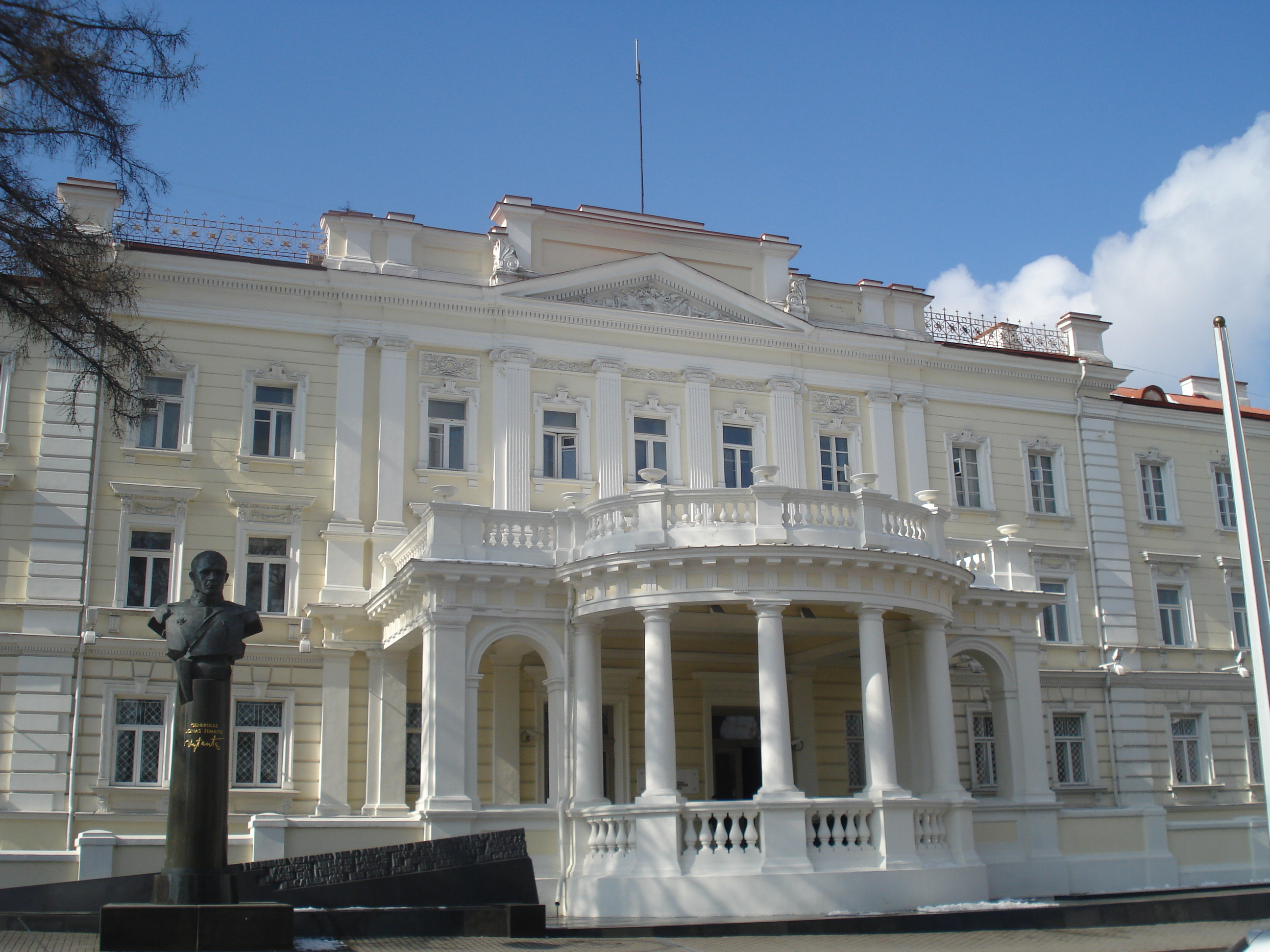 Ministry of National Defence of Lithuania. Krašto apsaugos ministerija. Totorių g. 25/3